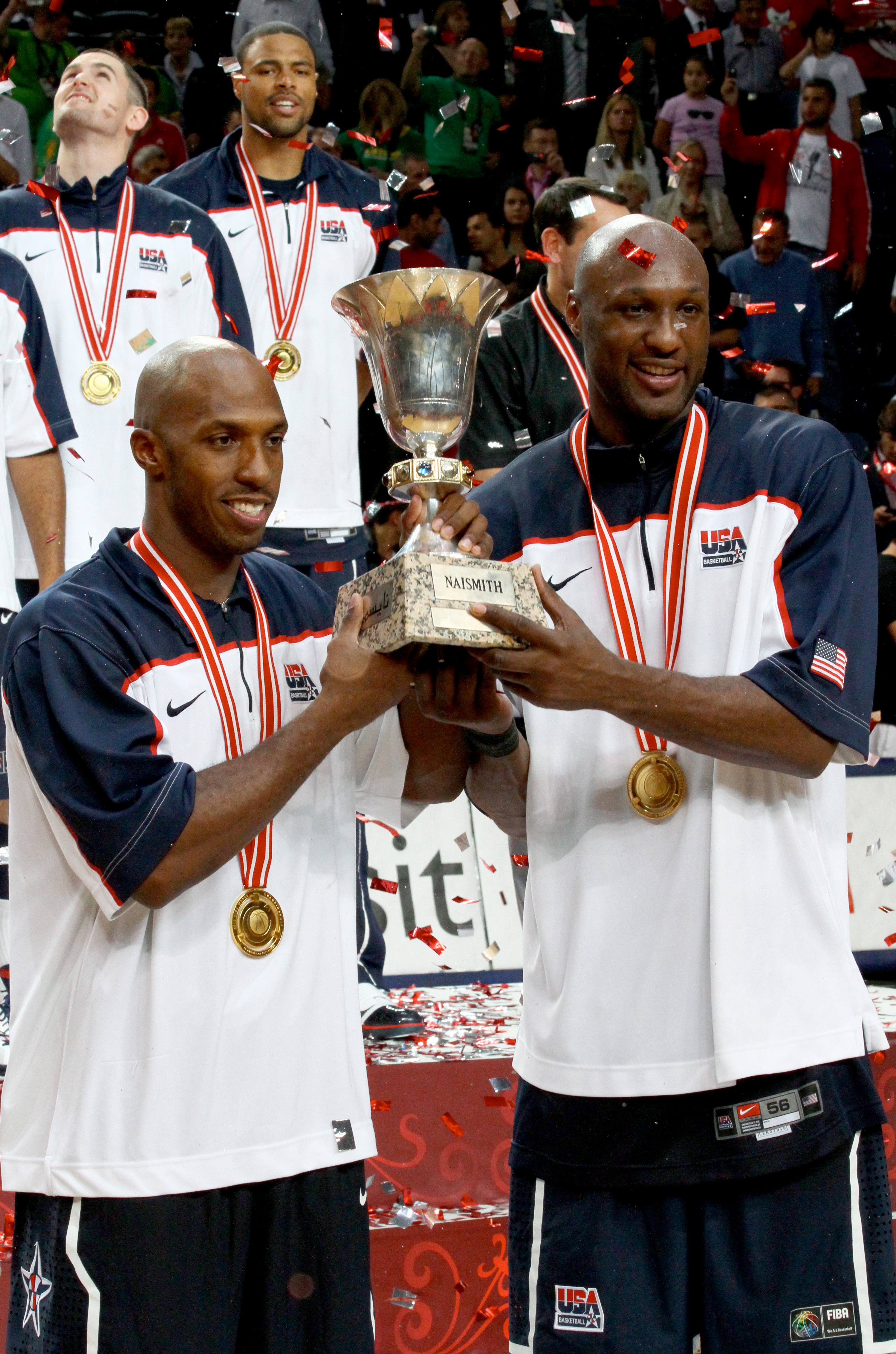 Chauncey Billups y Lamar Odoms, sosteniendo el recién ganado trofeo del Mundial de baloncesto 2010.